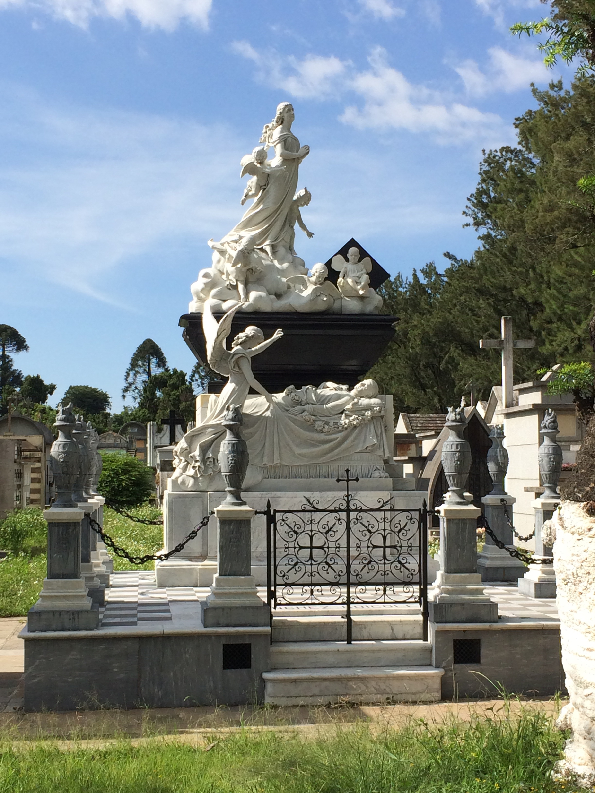 Tumba de doña Agapita, mausoleo en mejor estado de conservación del Cementerio General de la Ciudad de Guatemala